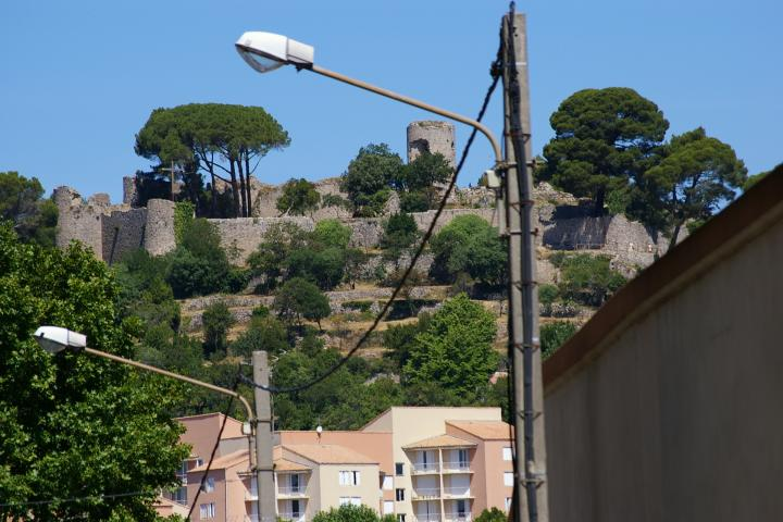 Château des Guilhem at Clermont-l'Hérault, (Hérault) France.